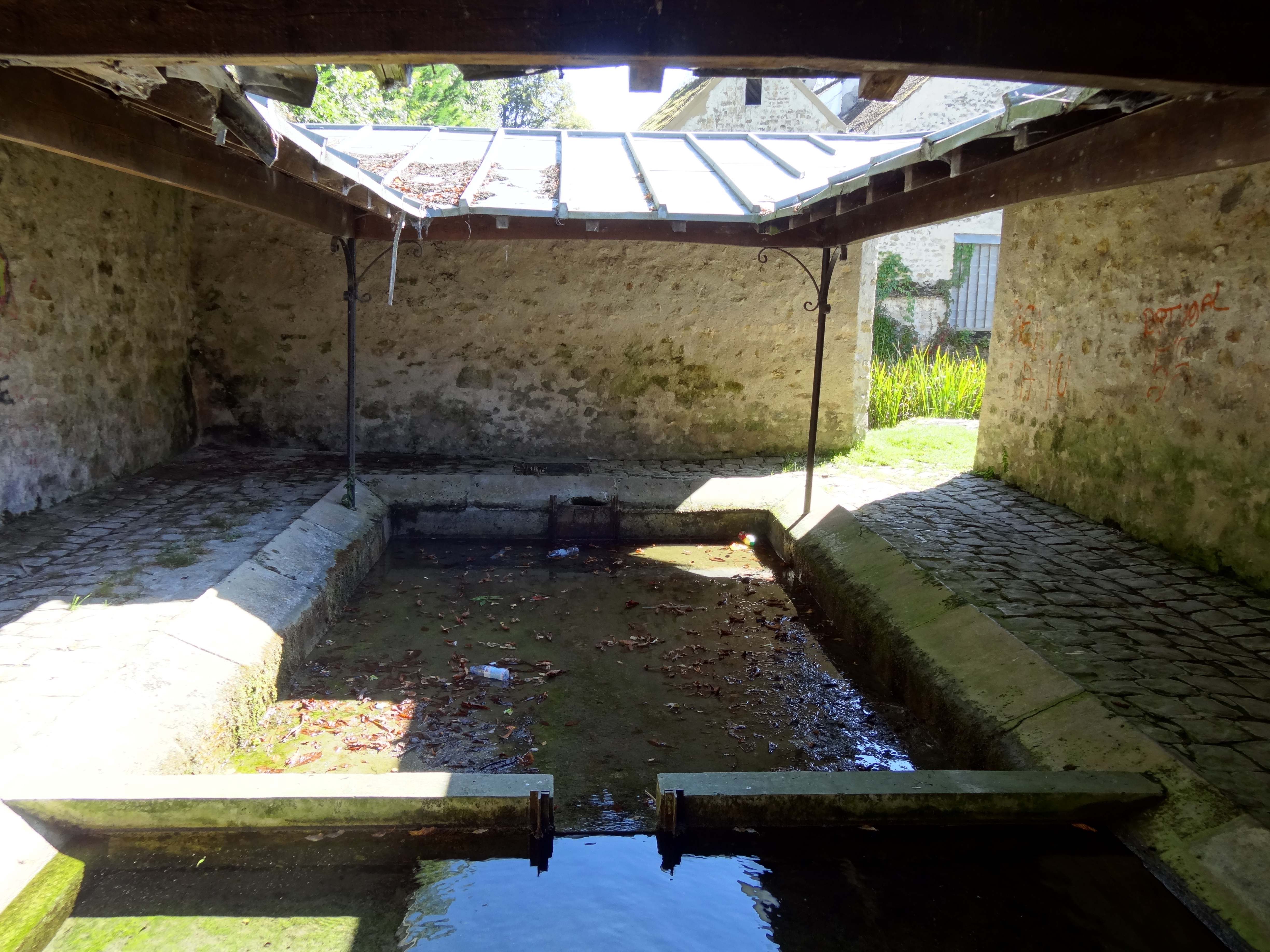 Hameau de Rueil - voir titre.